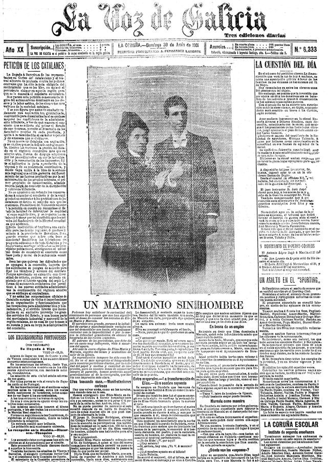 La Voz de Galicia. Año XX, n.º 6.333. La Coruña, domingo 30 de junio de 1901.